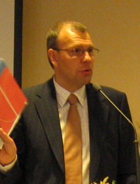 Kari Lautjärvi